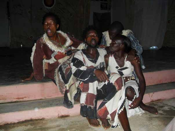 Photographie prise lors du spectacle Timda M'Bala en juillet 2009 à Lomé, Togo.